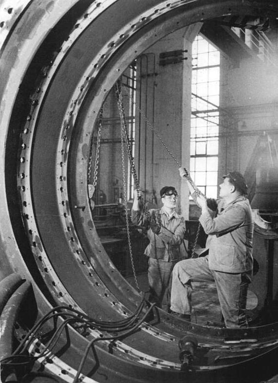 "Zentralbild-Biscan Froe-Ho. 2.1.1959 Magdeburg: GroÃŸfilter fÃ¼r die chemische Industrie. Im Magdeburger Schwermaschinenbau "Karl Liebknecht" wird im Filterbau fast ausschlieÃŸlich fÃ¼r die chemische Industrie der DDR und der anderen sozialistischen LÃ¤nder gearbeitet. In Erkenntnis der besonderen Rolle, die dem Filterbau in unserer Volkswirtschaft zukommt, hatten die Kollegen alles getan, um gute Voraussetzungen fÃ¼r einen gesunden Plananlauf 1959 zu garantieren. Das ist ihnen gelungen. Auch haben sie nicht vergessen zu Ã¼berlegen, inwieweit sie sich dem Aufruf der Belegschaft des Elektrochemischen Kombinates Bitterfeld anschlieÃŸen kÃ¶nnen. In einem Acht-Punkte-Programm wurden Verpflichtungen Ã¼bernommen, die eine Steigerung der Produktionsergebnisse vorsehen. UBz: Metallputzer Erich Kaninke (links) und der zweifache Aktivist Rudolf Lippoldt, Brigadier der GuÃŸschweiÃŸer, bei der Arbeit an der Trommel eines 20-Quadratmeter-Trommelfilters, der im Laufe des Jahres auch an das Elektrochemische Kombinat Bitterfeld geliefert wird. Die Filterbauer des Liebknecht-Werks haben sich verpflichtet, dem EKB insgesamt fÃ¼nf Vakuumtrommelzellenfilter termingemÃ¤ÃŸ zu liefern."